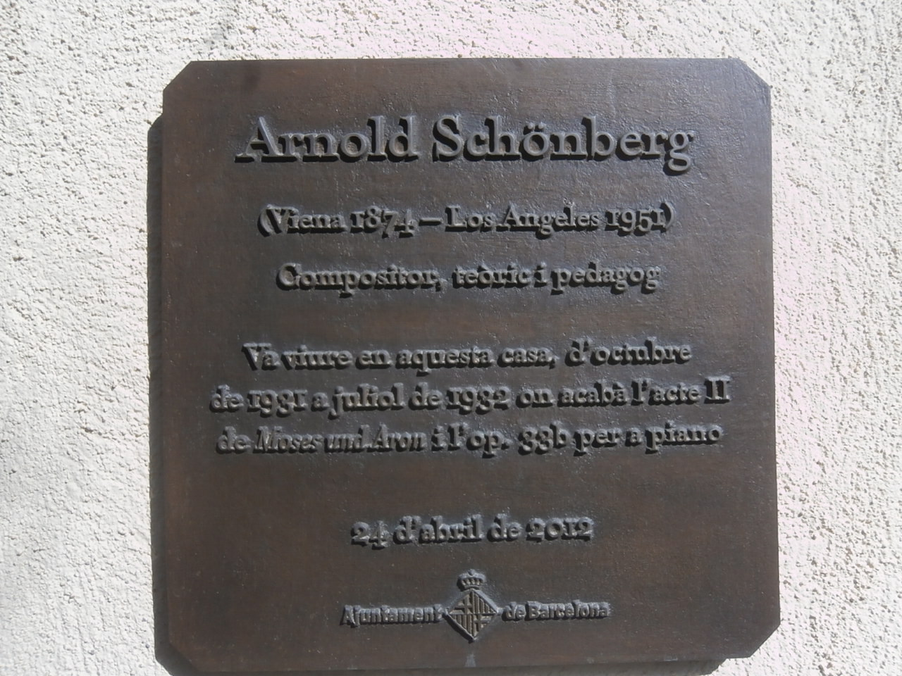 Placa a la casa on va residir Schönberg entre l'octubre de 1931 i el juliol de 1932, a la Baixada de Briz, 22-24, al barri de Vallcarca de Barcelona